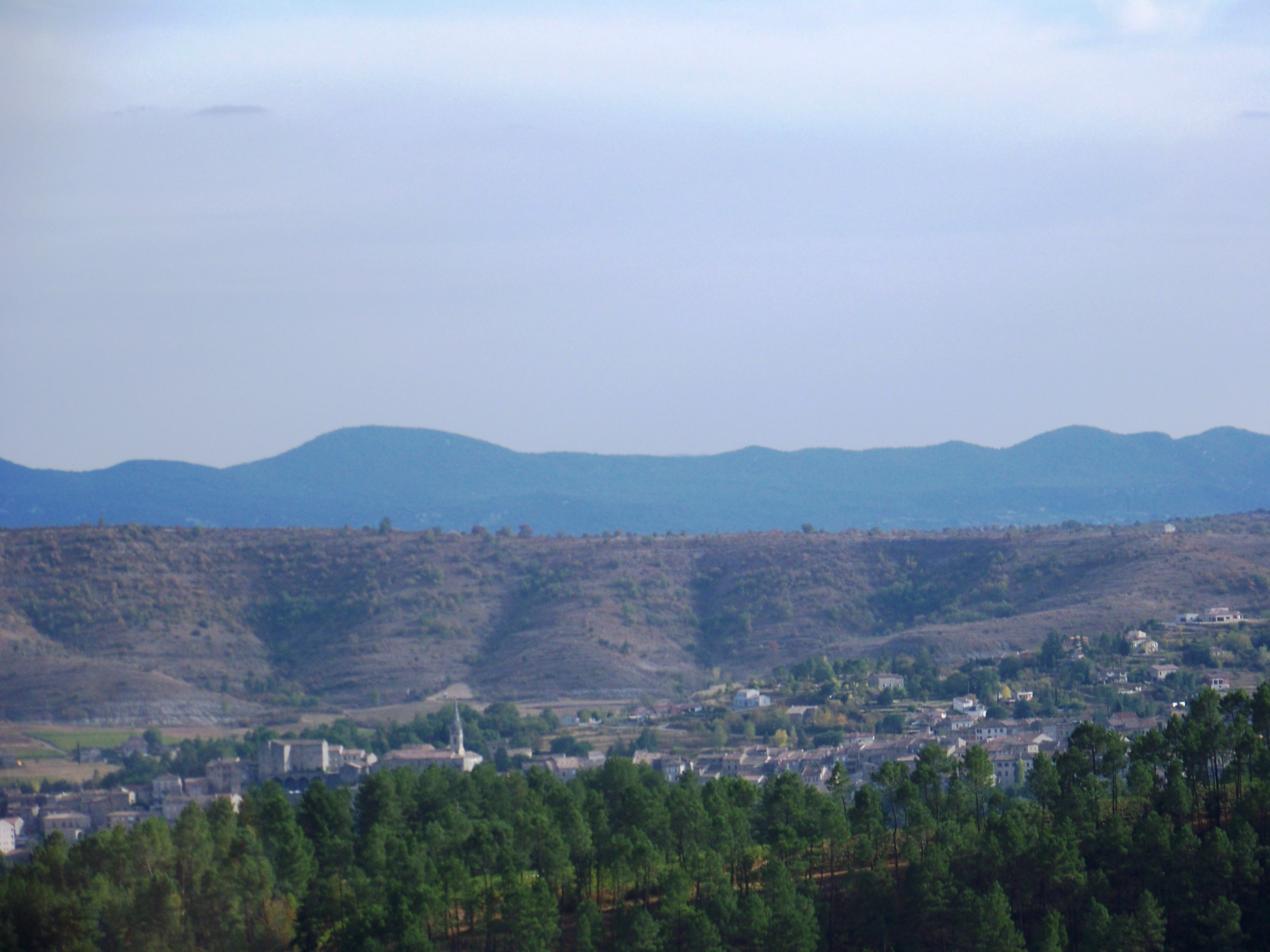 Joyeuse vue des cotes de Vernon